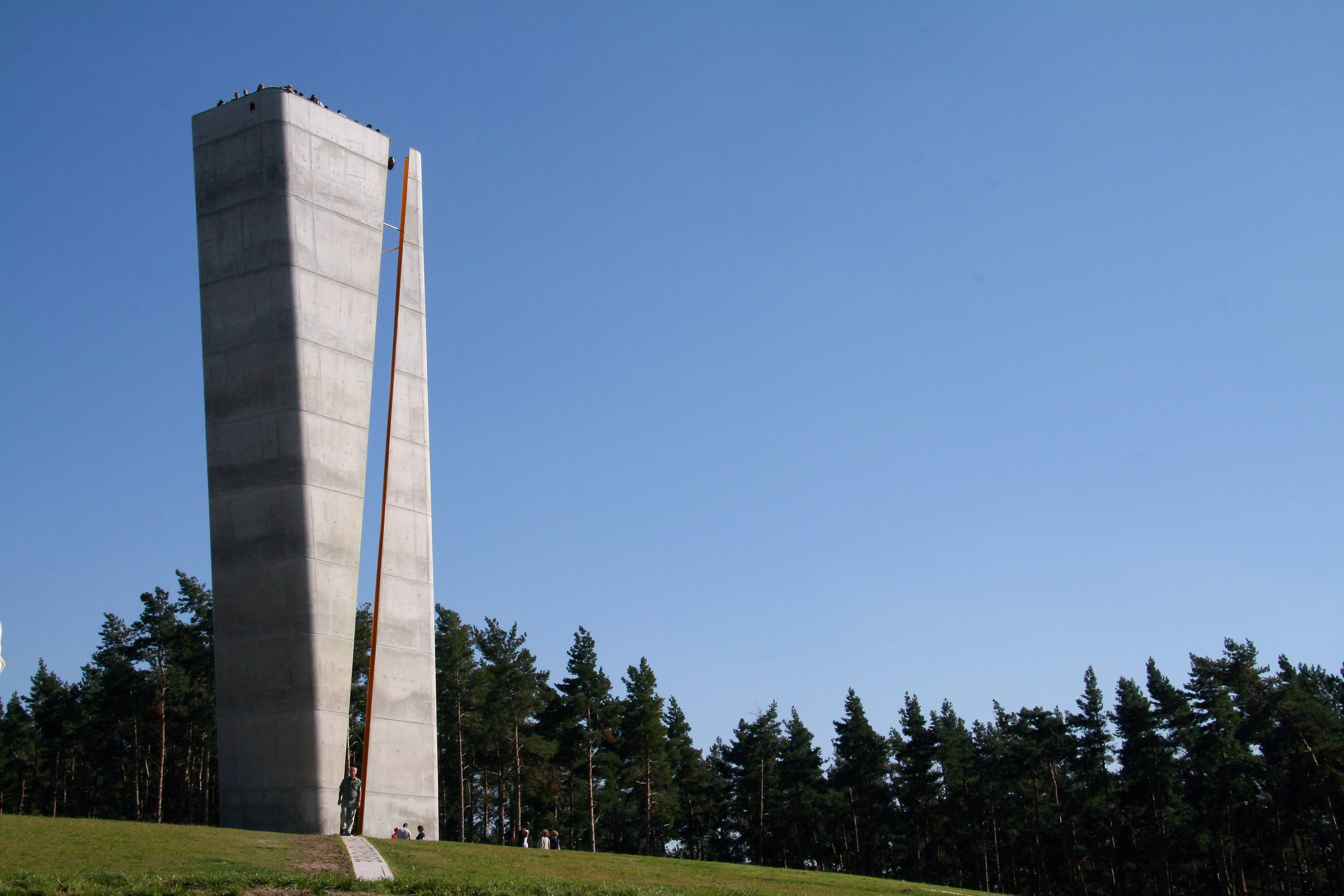 Aussichtsturm (30 m hoch,10 Grad geneigt) an der Fundstelle der Himmelsscheibe auf dem Mittelberg. Westseite des Turms. Der Spalt teilt den Turm und bildet eine Sichtachse zum Brocken. Dort geht zur Sommersonnenwende die Sonne unter.